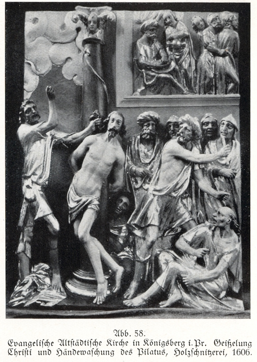 Königsberg, Evangelische Altstädtische Kirche, Geißelung Christi und Händewaschung des Pilatus, Holzschnitzerei, 1606